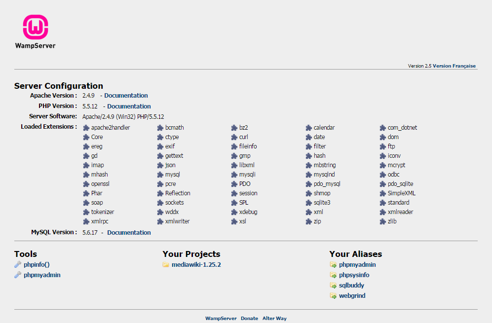 Screenshot of the current Version 2.5 of WampServer.